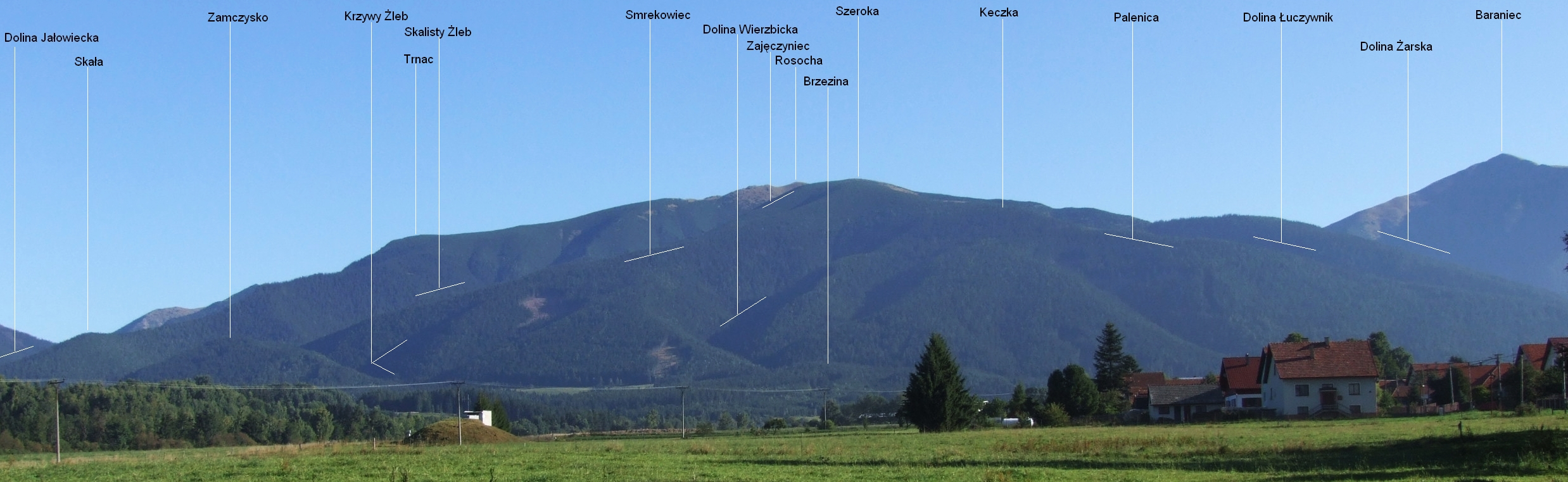 Widoka z Żaru